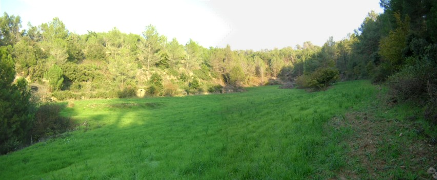 Camps del Francesc (Monistrol de Calders, Moianès)